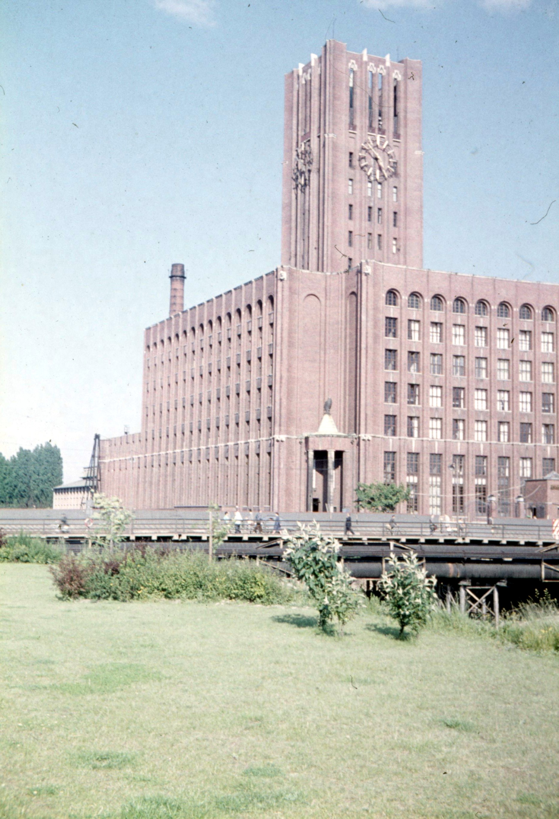 Bau U-Bahnhof Ullsteinstraße